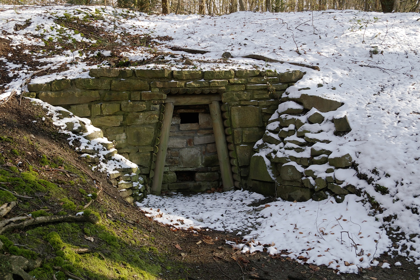 Syburger Bergbauweg, Stollen 2